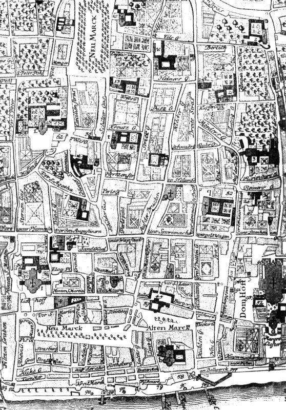 Kupferstich: Stadtplan Reinhardt (1752)